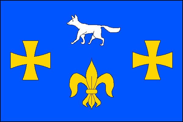 vlajka, Pokojov, okres Žďár nad Sázavou